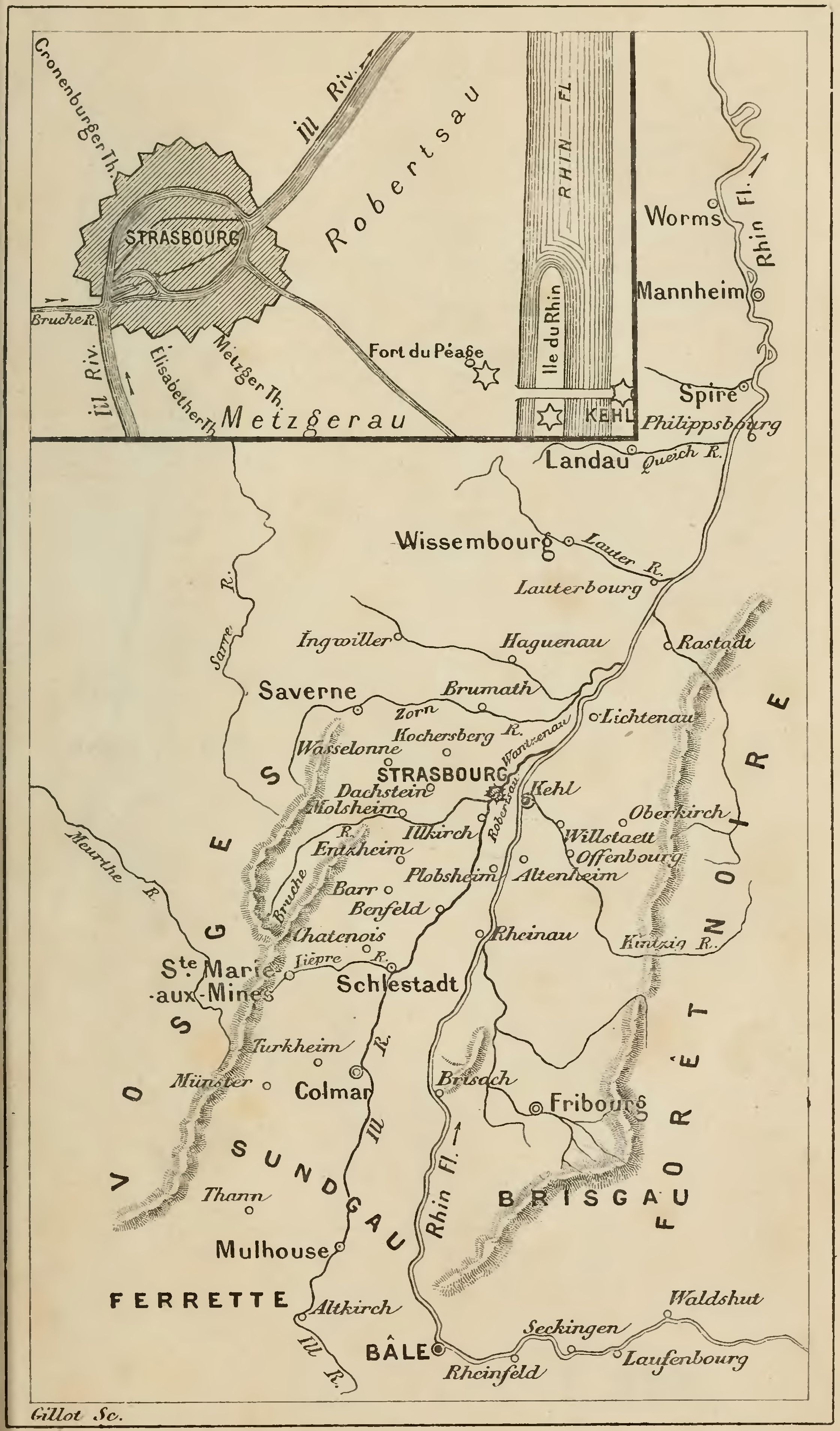 Strasbourg et ses environs. 17 siècle